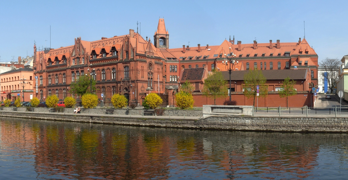 Budynek Poczty Głównej w Bydgoszczy przy ul. Jagiellońskiej (zbud. 1883 skrzydło płd, 1899 skrzydło płn)